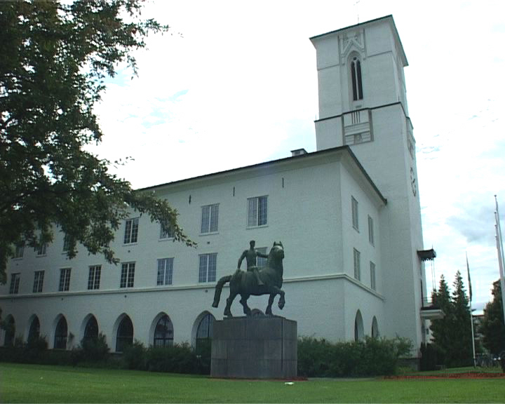 Bærum rådhus med rytterstatuen Friheten.